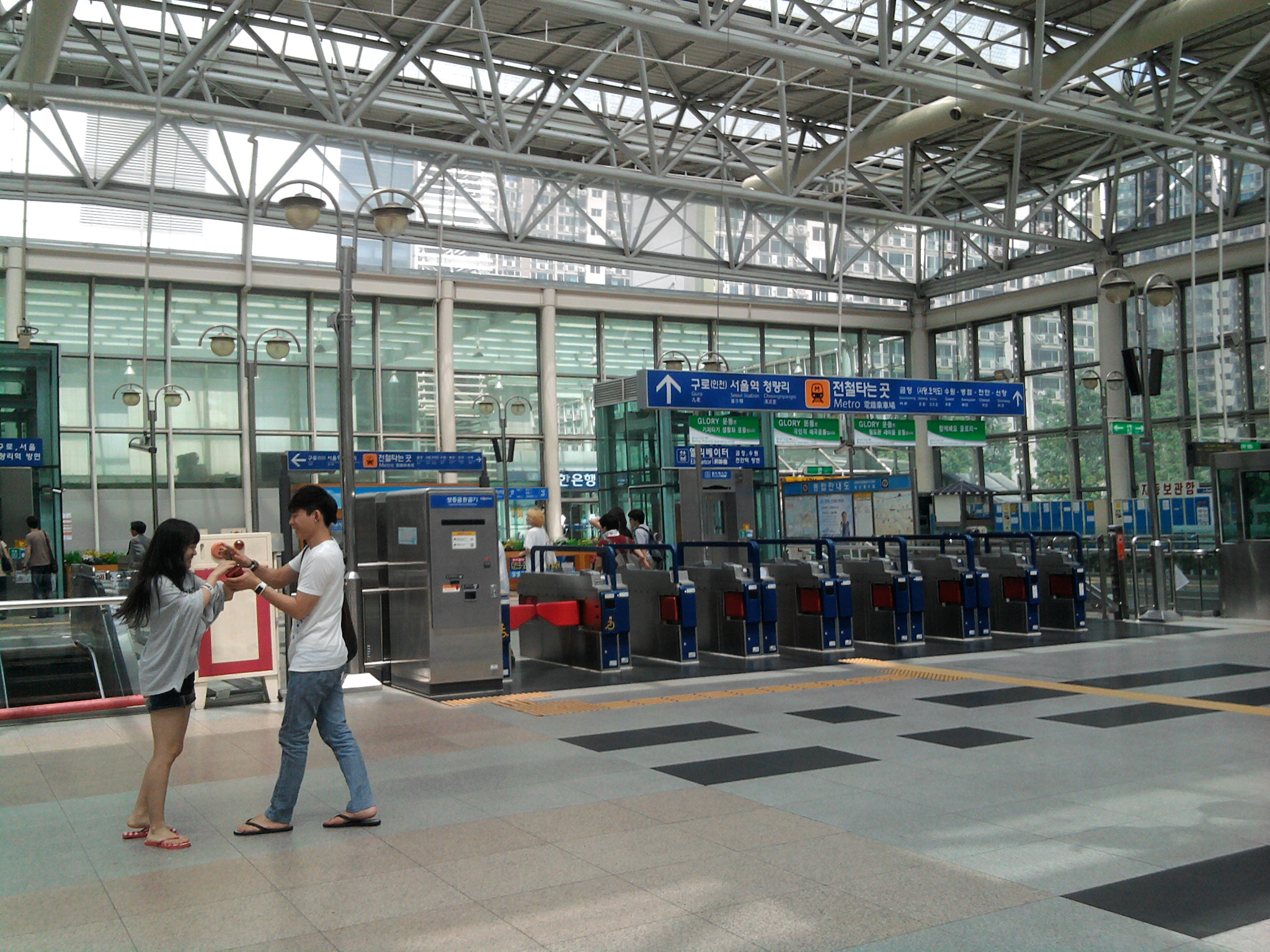 安養駅コンコース